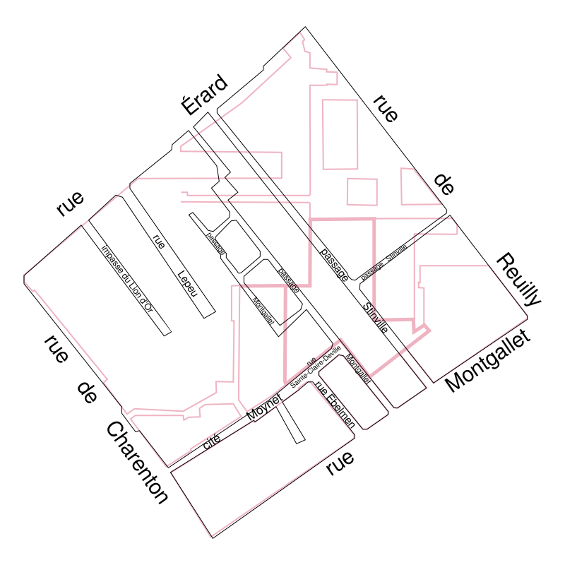 Plan de l'îlot Saint-Éloi avant l'opération de rénovation (1958-1977) avec en superposition le nouveau tracé des rues